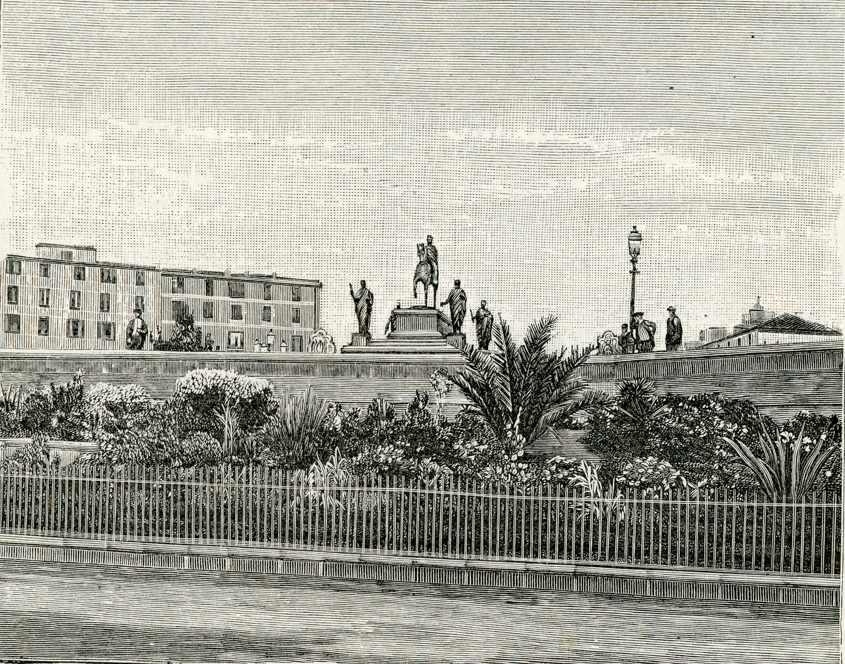 Ajaccio: monumento ai cinque fratelli Bonaparte (incisore anonimo 1894).